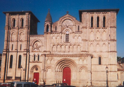 Façade de l'église Sainte-Croix de Bordeaux, au soleil couchant.